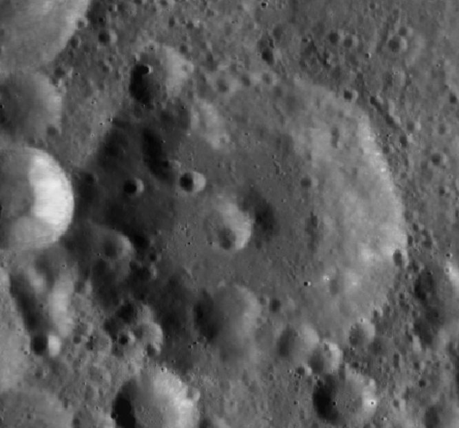 Cráter lunar Zernike. (Imagen LRO)